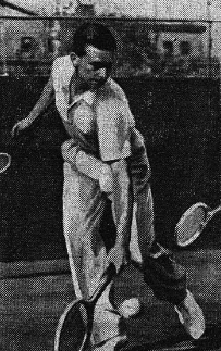 Jean Lesueur aux championnats d'Allemagne à Berlin en 1938.